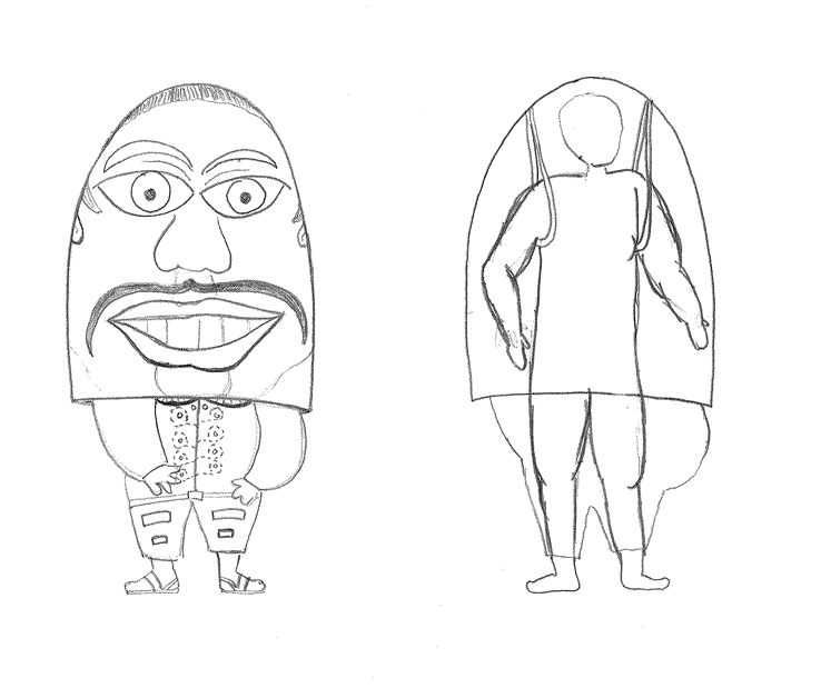 Bosquejo de diseño disfraz Enano de Cicuco, Carnaval de Barranquilla